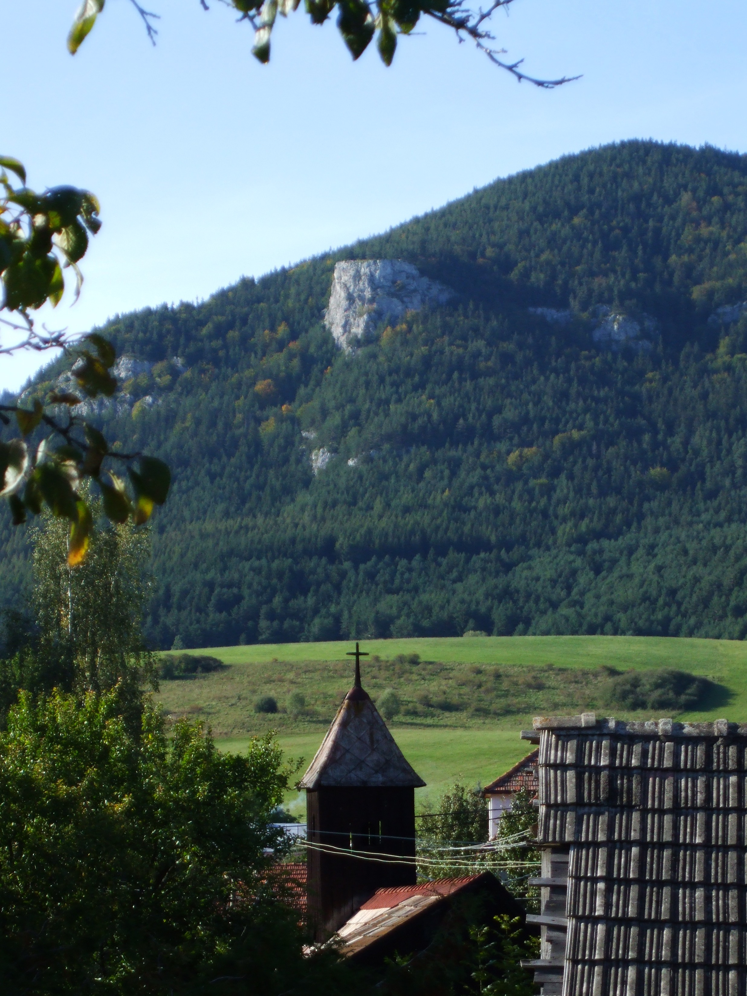 krajina